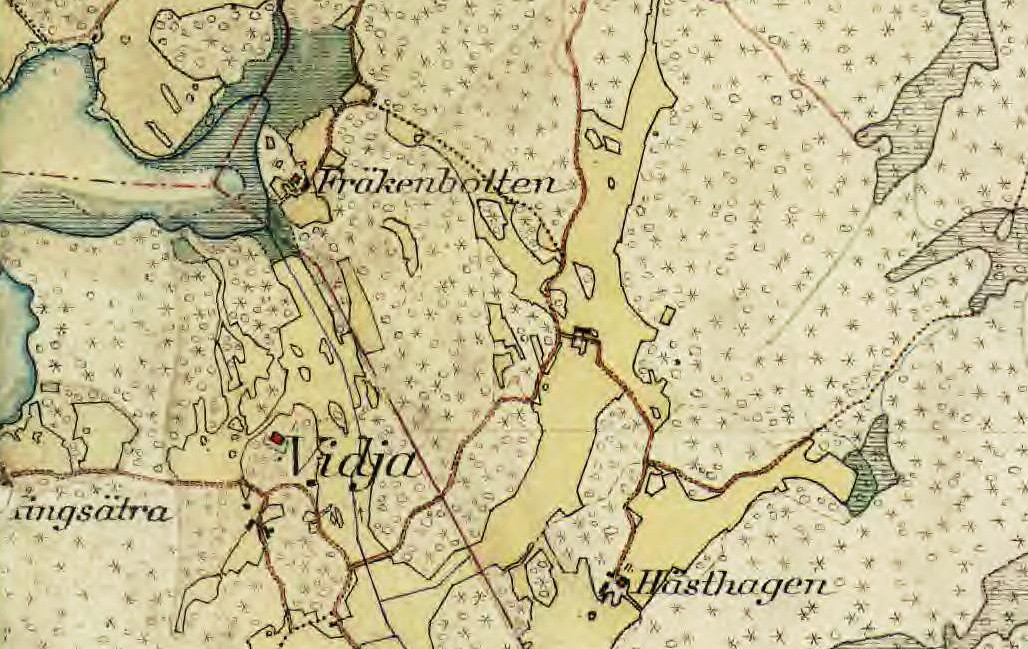 Torpen Fräkenbotten, Hästhagen, Vidja på Häradsekonomiska kartan